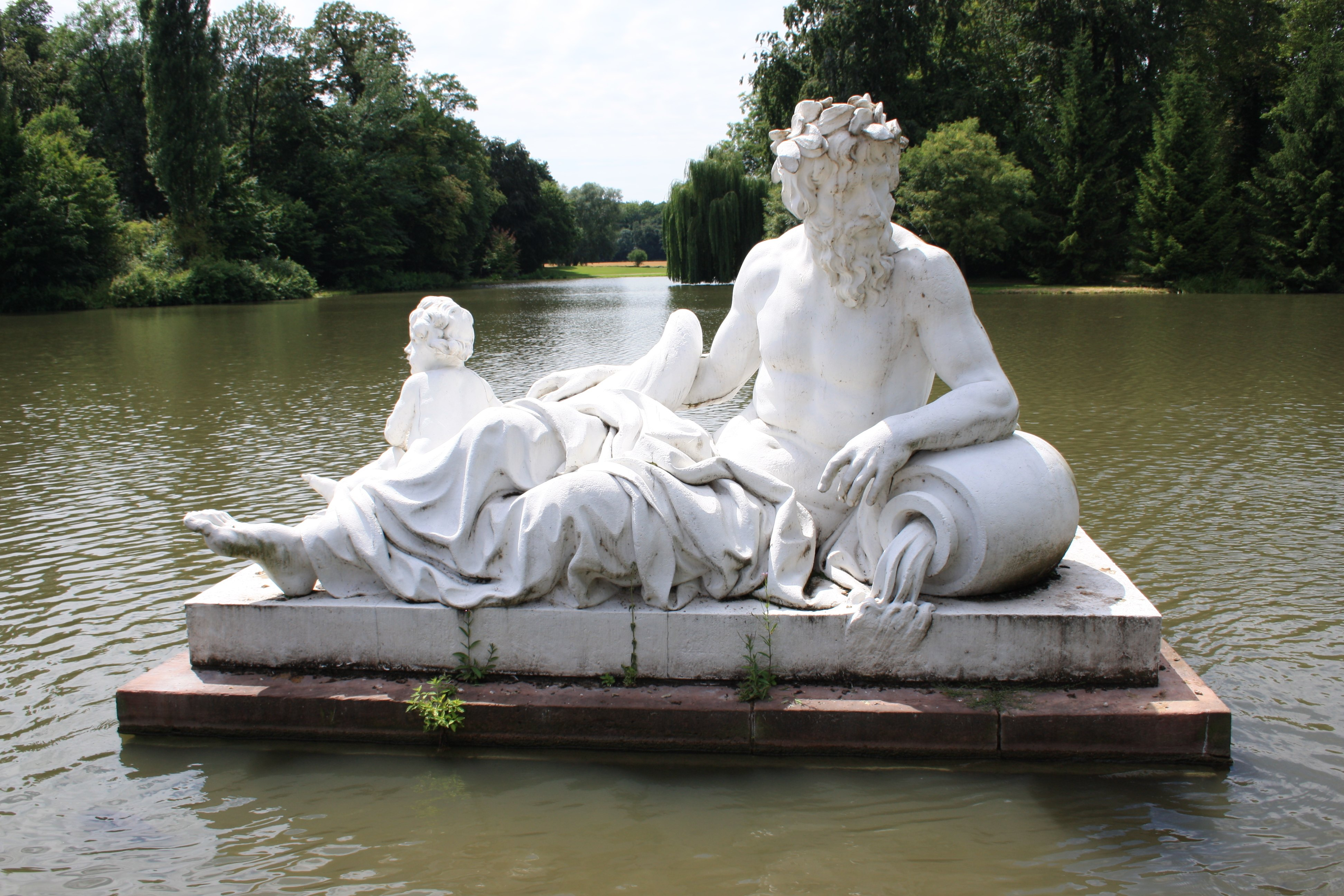 Rhein Peter Anton von Verschaffelt (1710–1793) Alternative names Pietro il Fiammingo Verschaffelt; Pieter Antonie von Verschaffelt; Peter Anton VerschaffeltDescriptionDutch- sculptor and architectDate of birth/death 8 May 1710 5 July 1793Location of birth/death Ghent MannheinWork location Paris, Roma, MannheimAuthority control : Q567395 VIAF: 15566009 ISNI: 0000 0000 6630 9167 ULAN: 500025716 LCCN: n84093170 Open Library: OL1828358A WorldCat creator QS:P170,Q567395